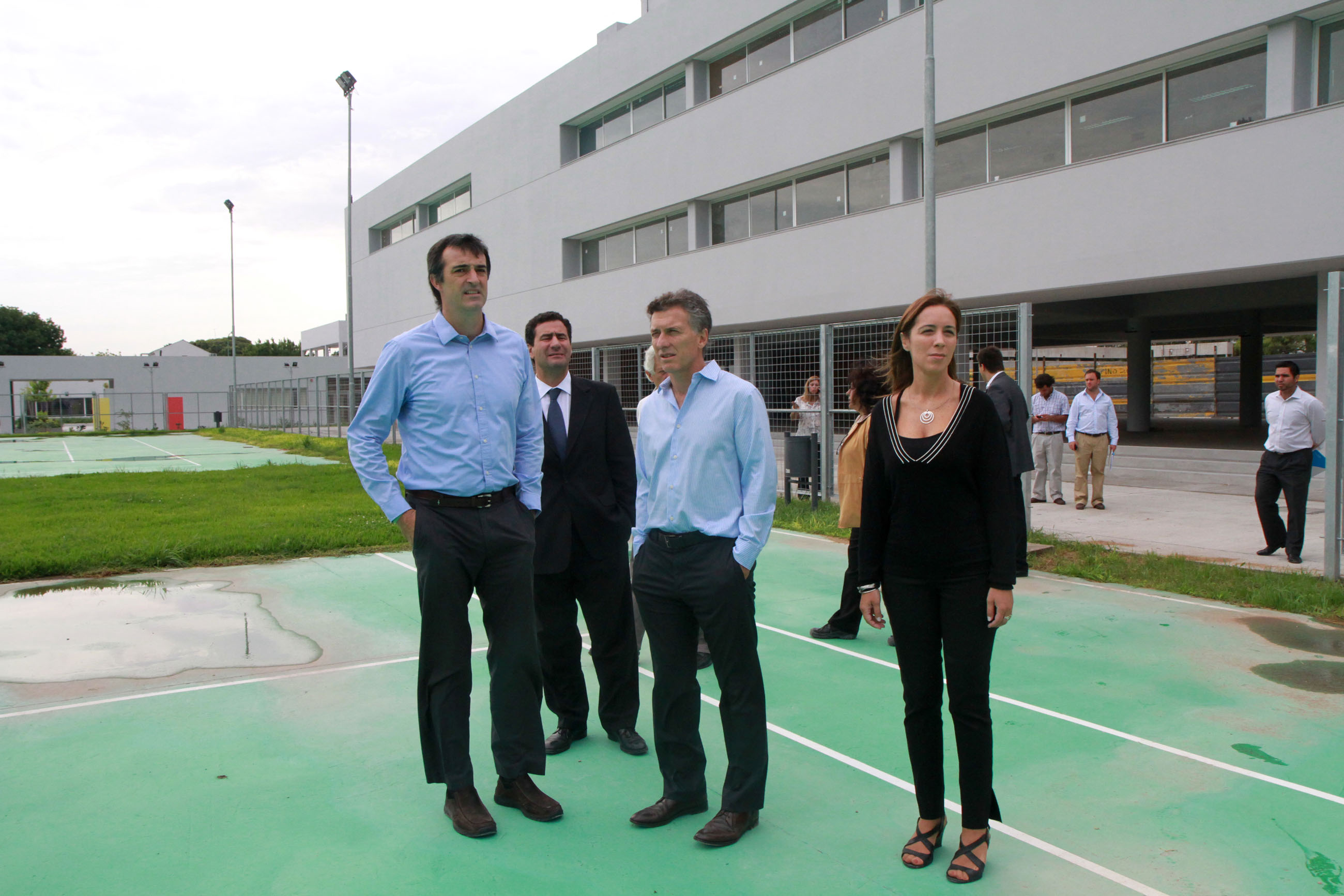 Buenos Aires, 31 de enero de 2012. El jefe y la vicejefa de Gobierno porteño, Mauricio Macri y María Eugenia Vidal, y el ministro de Educación de la Ciudad, Esteban Bullrich, supervisaron hoy las obras realizadas en la Escuela Media Técnica del Polo Educativo Saavedra. Foto: Matías Repetto/GCBA